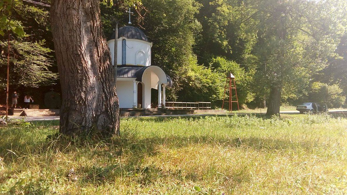 Црква Св. Петке као дио парка природе Вучијак PPP030